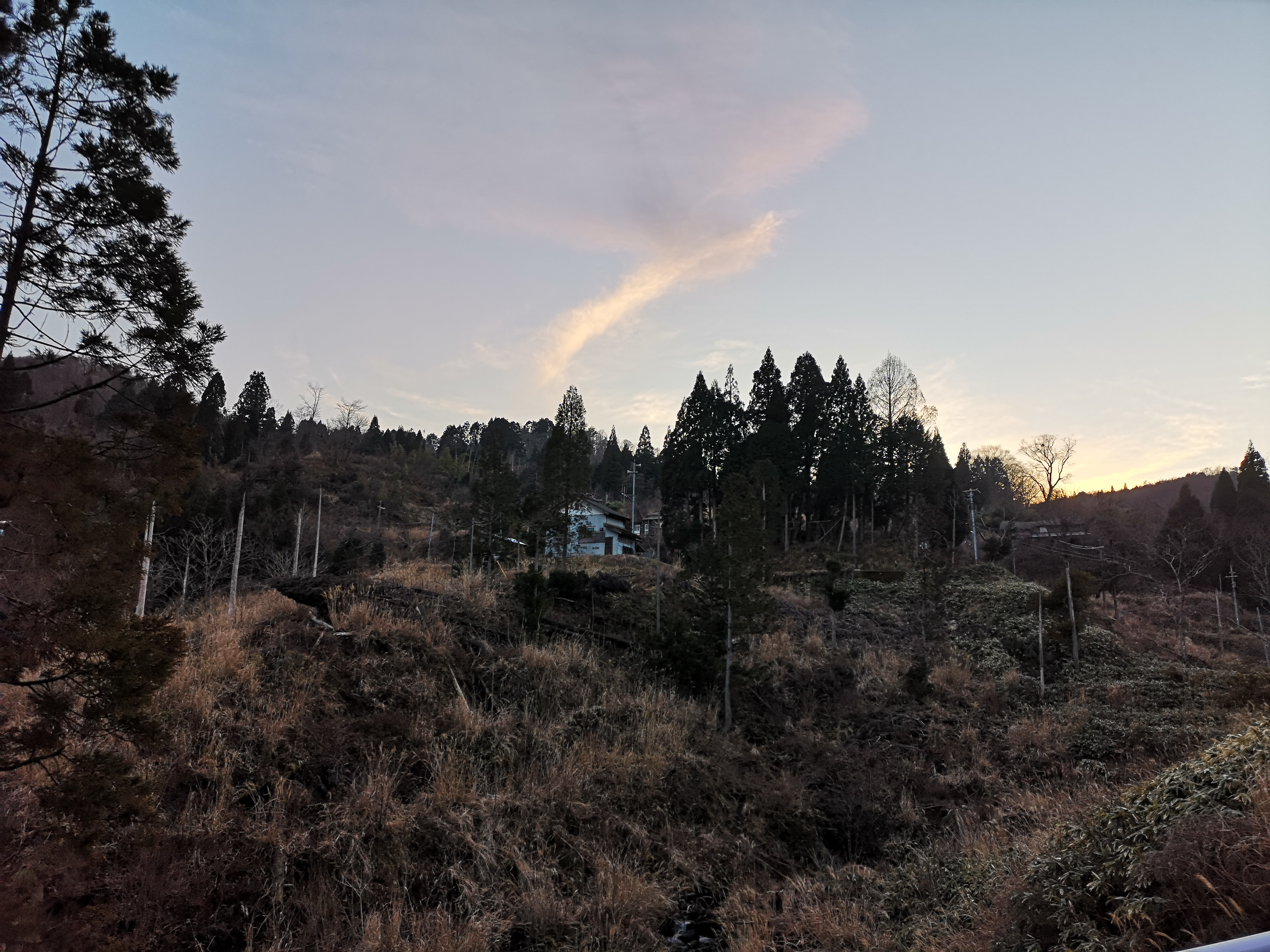 山中から味土野集落を見上げる。（京都府京丹後市弥栄町須川）